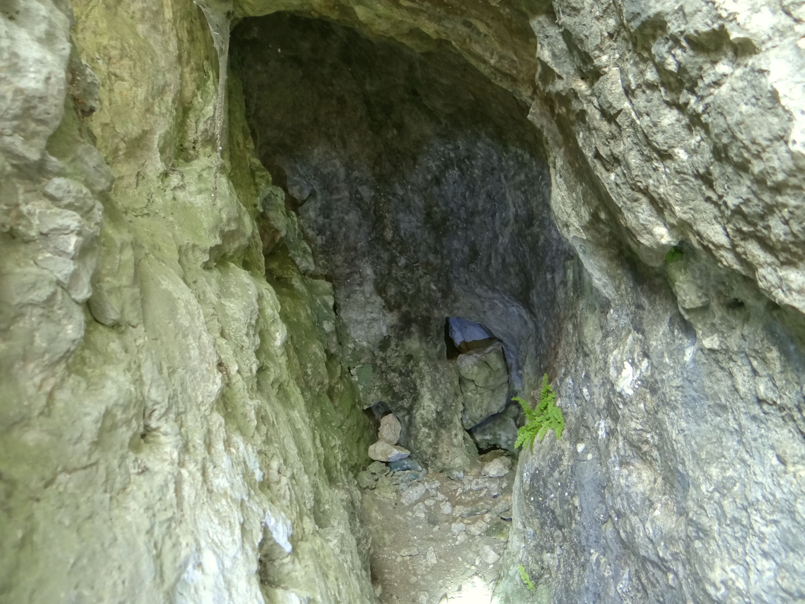 Szczelina w Bramie Kobylańskiej